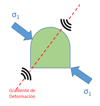 ruido